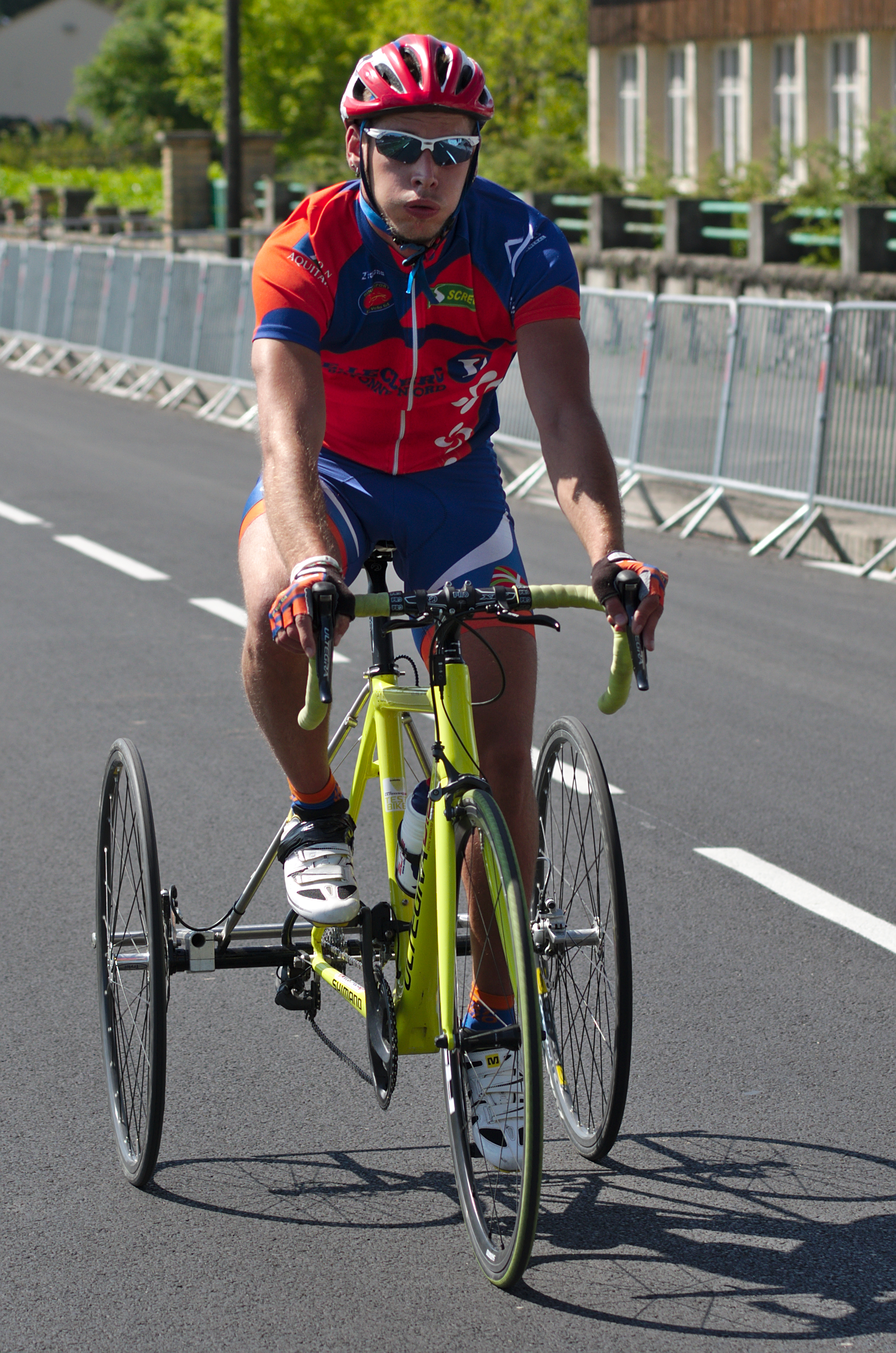 Championnat de France de cyclisme handisport - 20140615 - Contre la montre